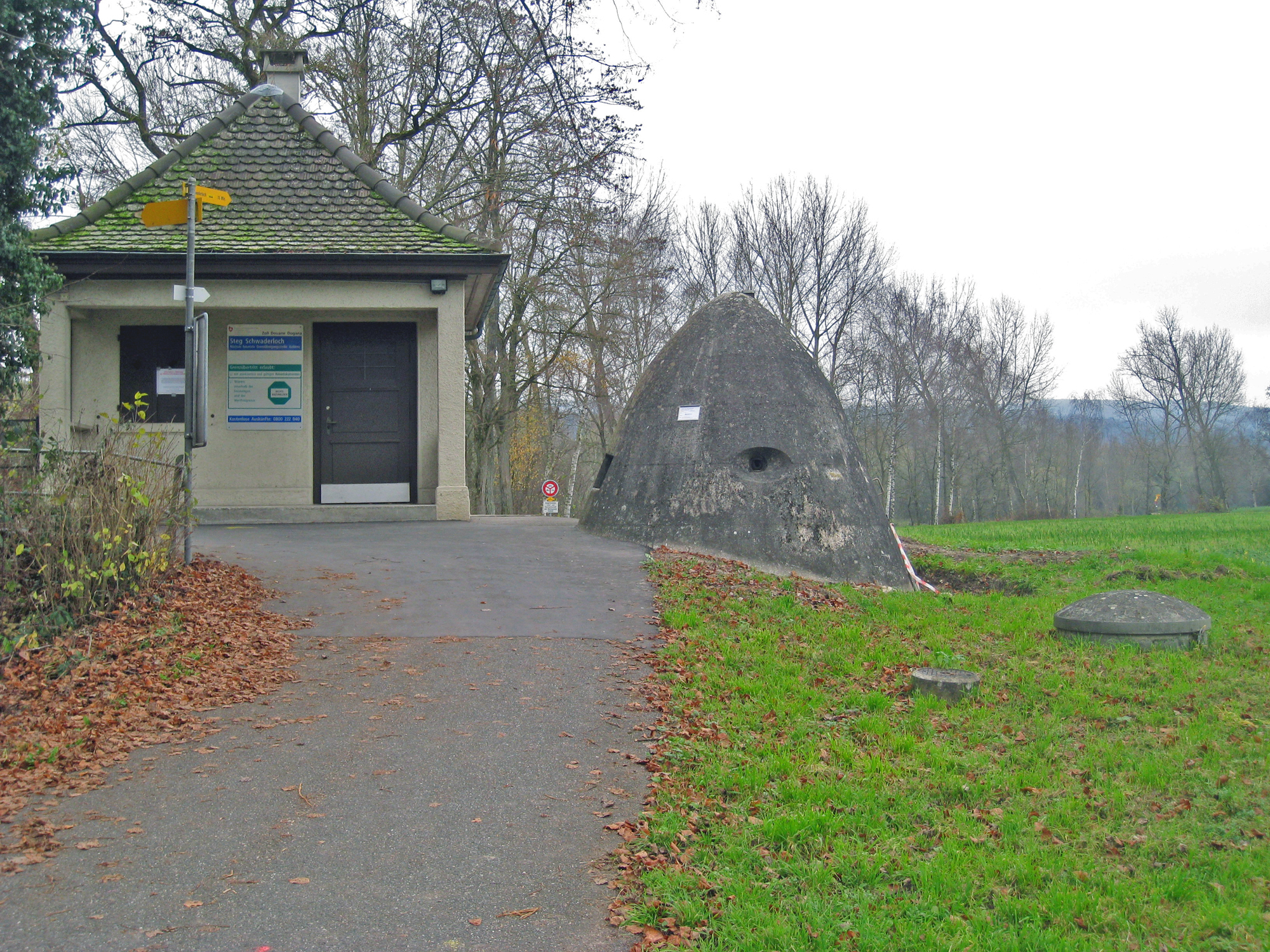 Zollhaus, Leichtstand A 4302 und Eingang Kugelbunker in Schwaderloch, Kanton Aargau